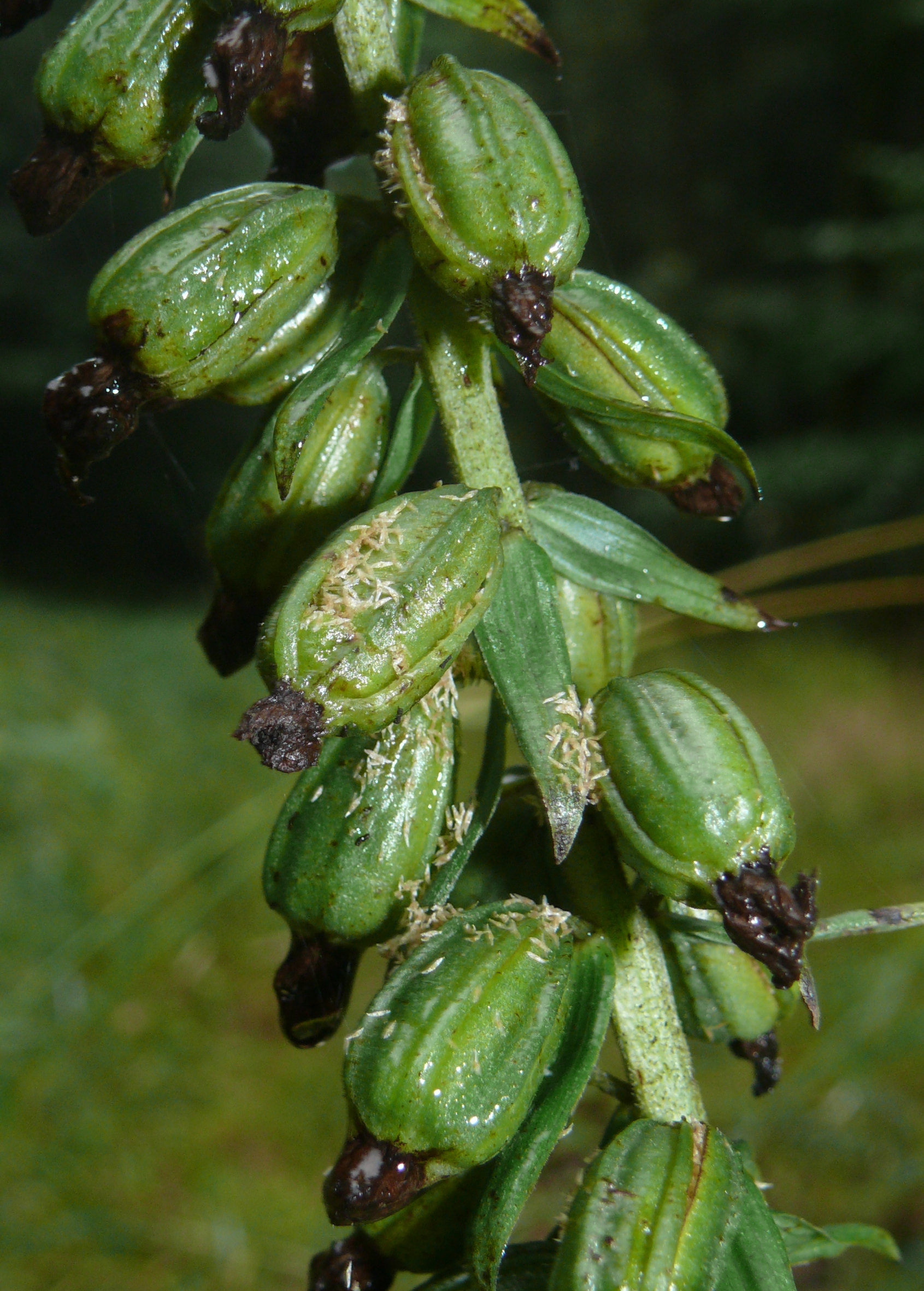 Epipactis helleborine, Schwäbisch-Fränkische Waldberge, Deutschland